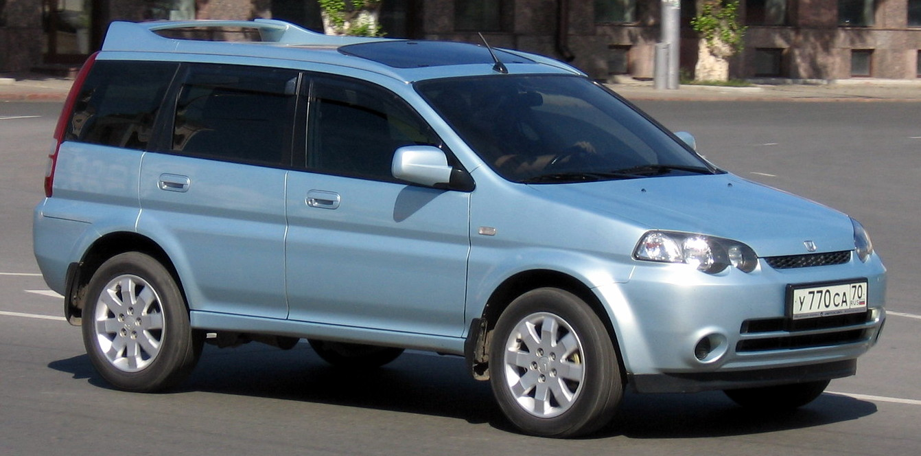 Photo taken in Tomsk, Russia